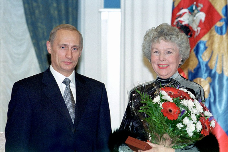 МОСКВА, КРЕМЛЬ. Церемония вручения государственных наград. Орден «За заслуги перед Отечеством» IV степени вручен артистке Московского театра сатиры Вере Васильевой.